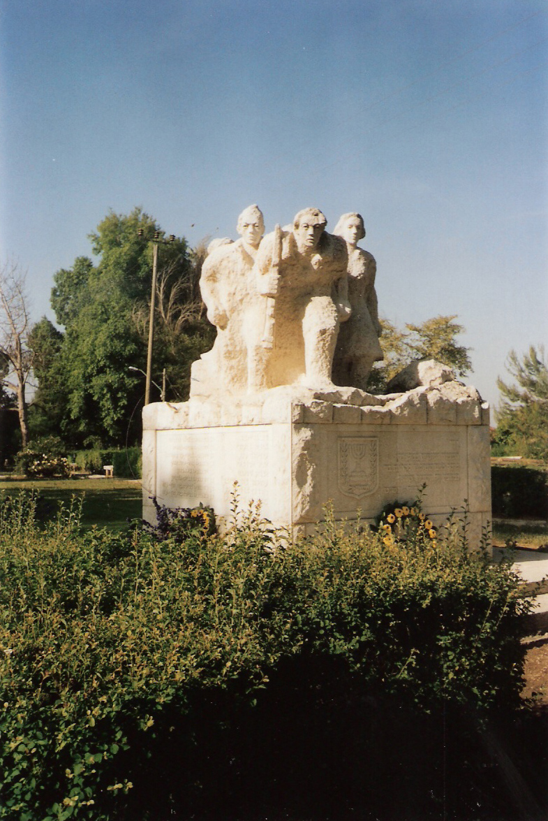 monument to fallen soldiers, kefar joshua, israel